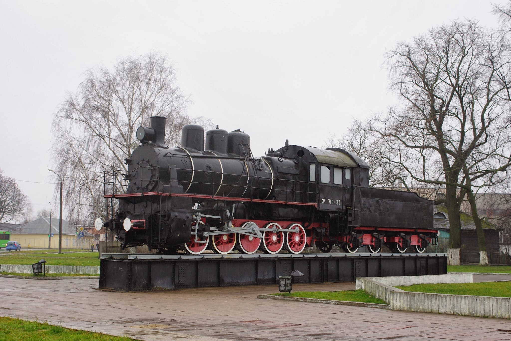 Baranovichi, Belarus